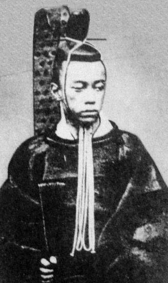 a Japanese man 伊達宗城 (Date Munenari)